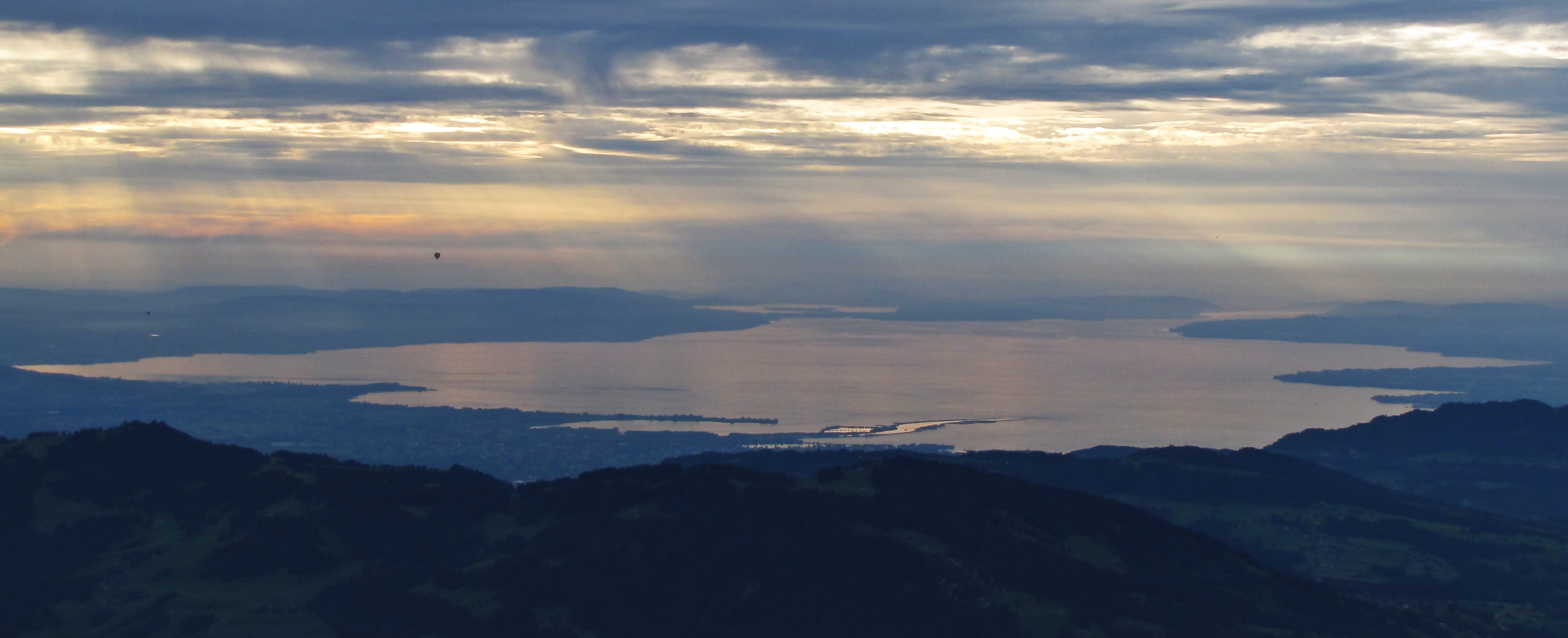 Abendlicher Blick von der Winterstaude (1877 m) auf den Bodensee (395 m), der in seiner Ost-West-Ausdehnung zu sehen ist.